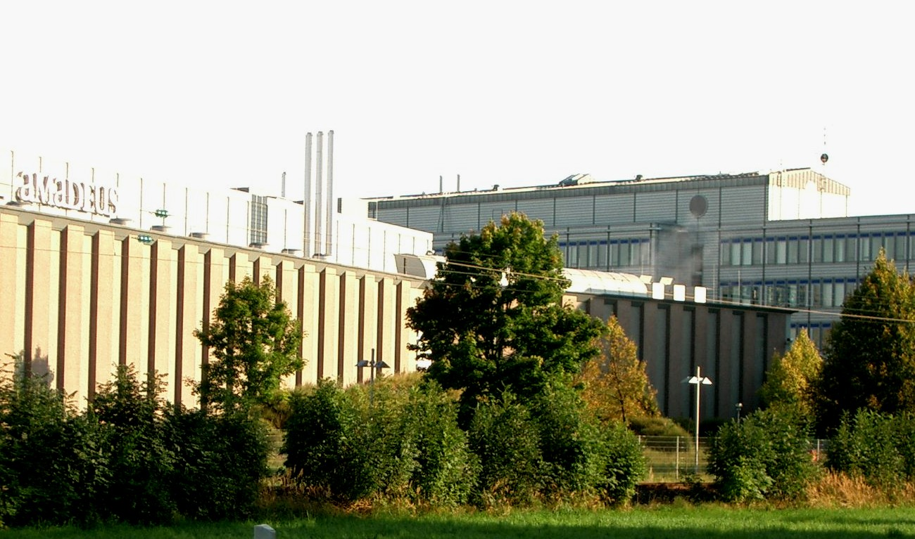 Erding, Amadeus Werk